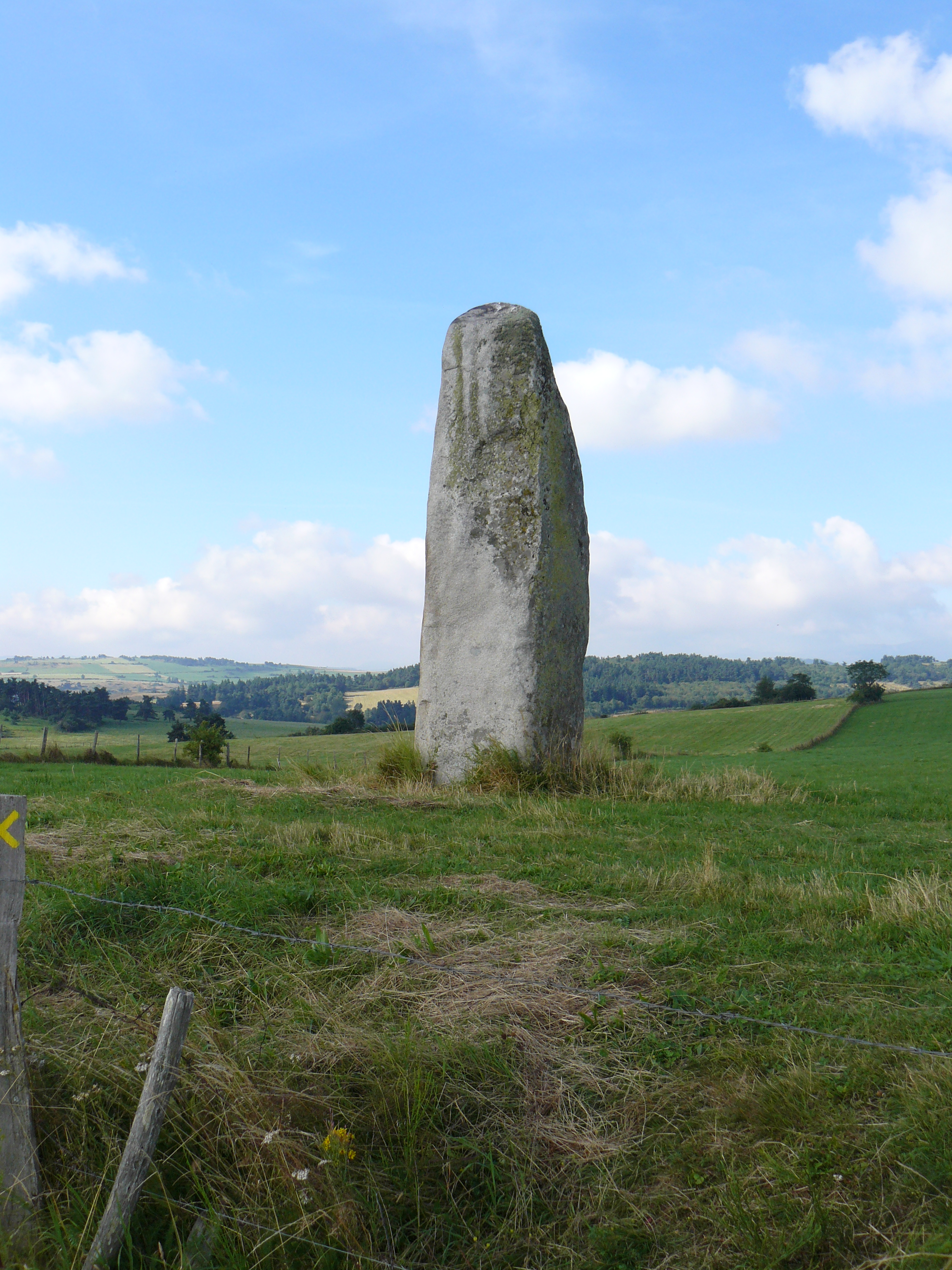 Le menhir de Fohet à Phialeix (commune d'Aydat, Puy-de-Dôme, France)